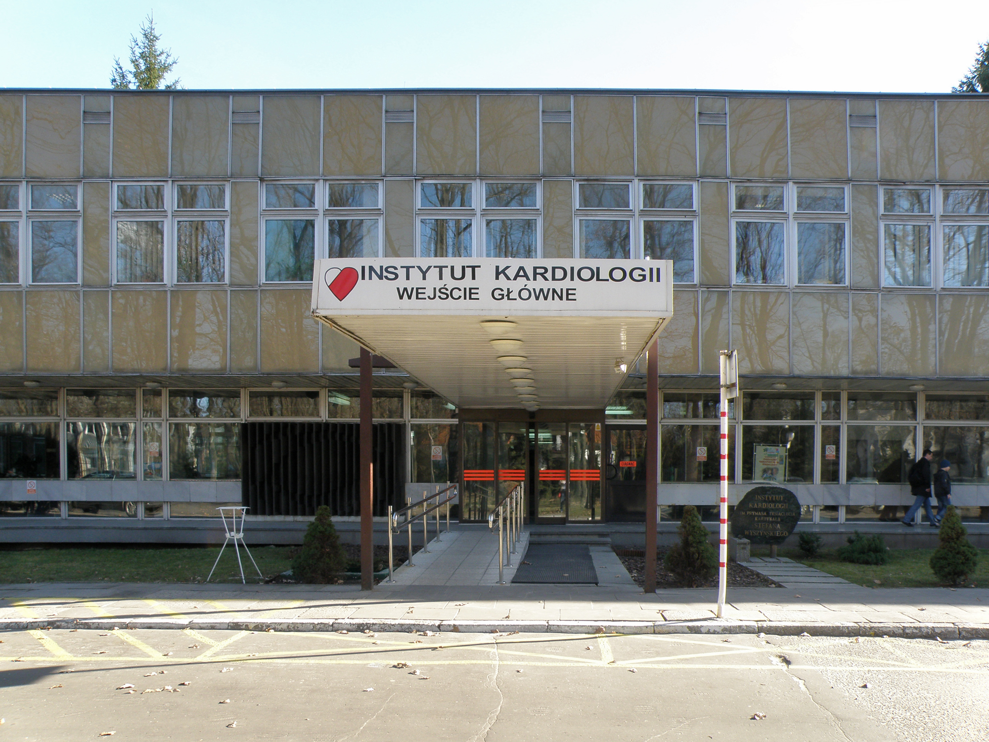 Instytut Kardiologii im. Prymasa Tysiąclecia Stefana Kardynała Wyszyńskiego, ul. Alpejska 42, 04-628 Warszawa, Anin